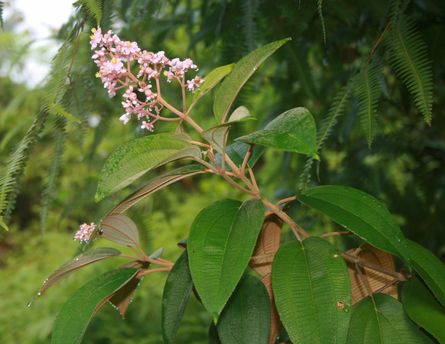 Conostegia xalapensis, Schwarzmundgewächse (Melastomataceae) - Costa Rica: Prov. Puntarenas, La Gamba NW Golfito, "Fila Trail" bei "Tropenstation La Gamba"/"Estación Biológica La Gamba"